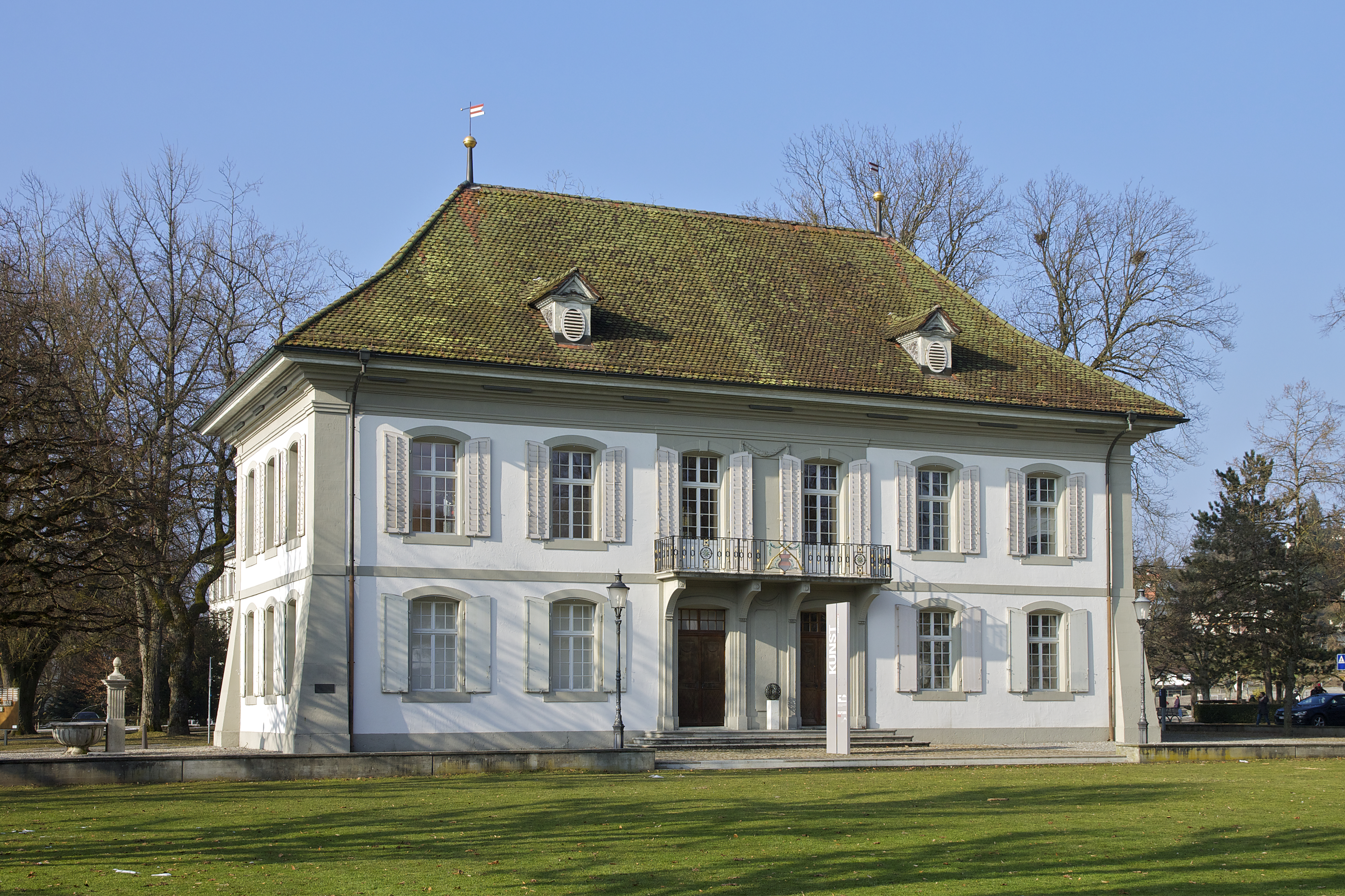 Das Alten Schützenhaus in Zofingen.